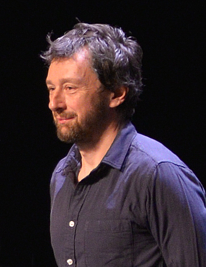 Clément Oubrerie, Festival d'Angoulême 2016.